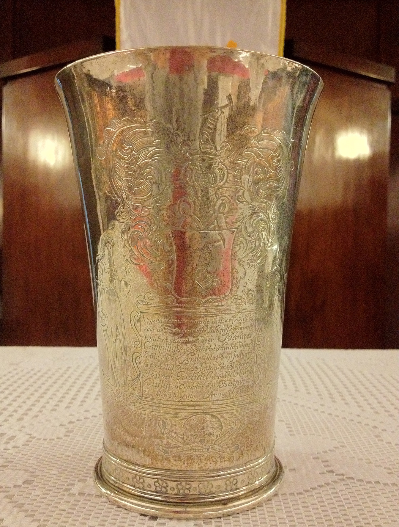 GPIB Paulus